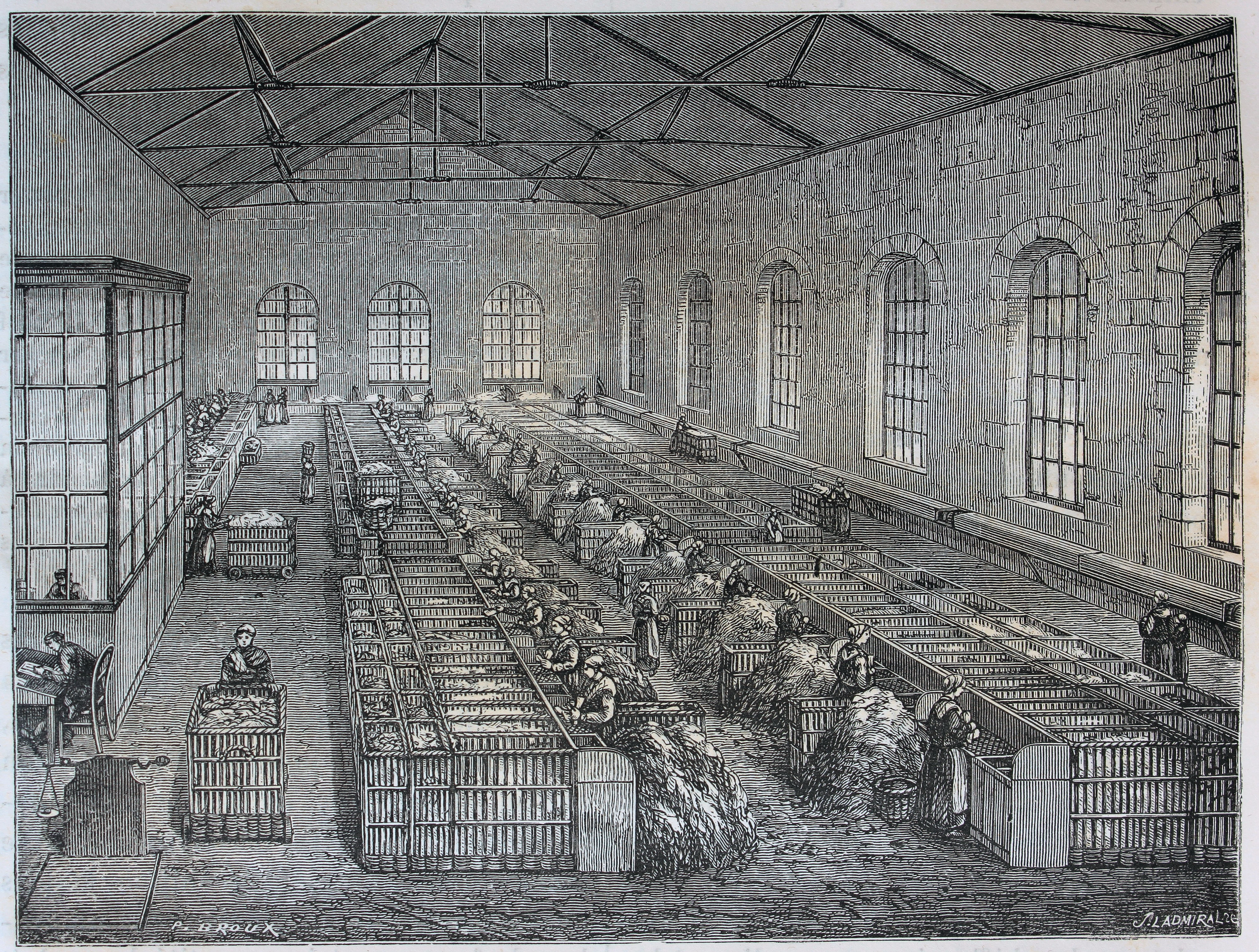 Ilustraciones de la obra : Les merveilles de l'industrie ou, Description des principales industries modernes / par Louis Figuier. - Paris : Furne, Jouvet, [1873-1877]. - Tome II